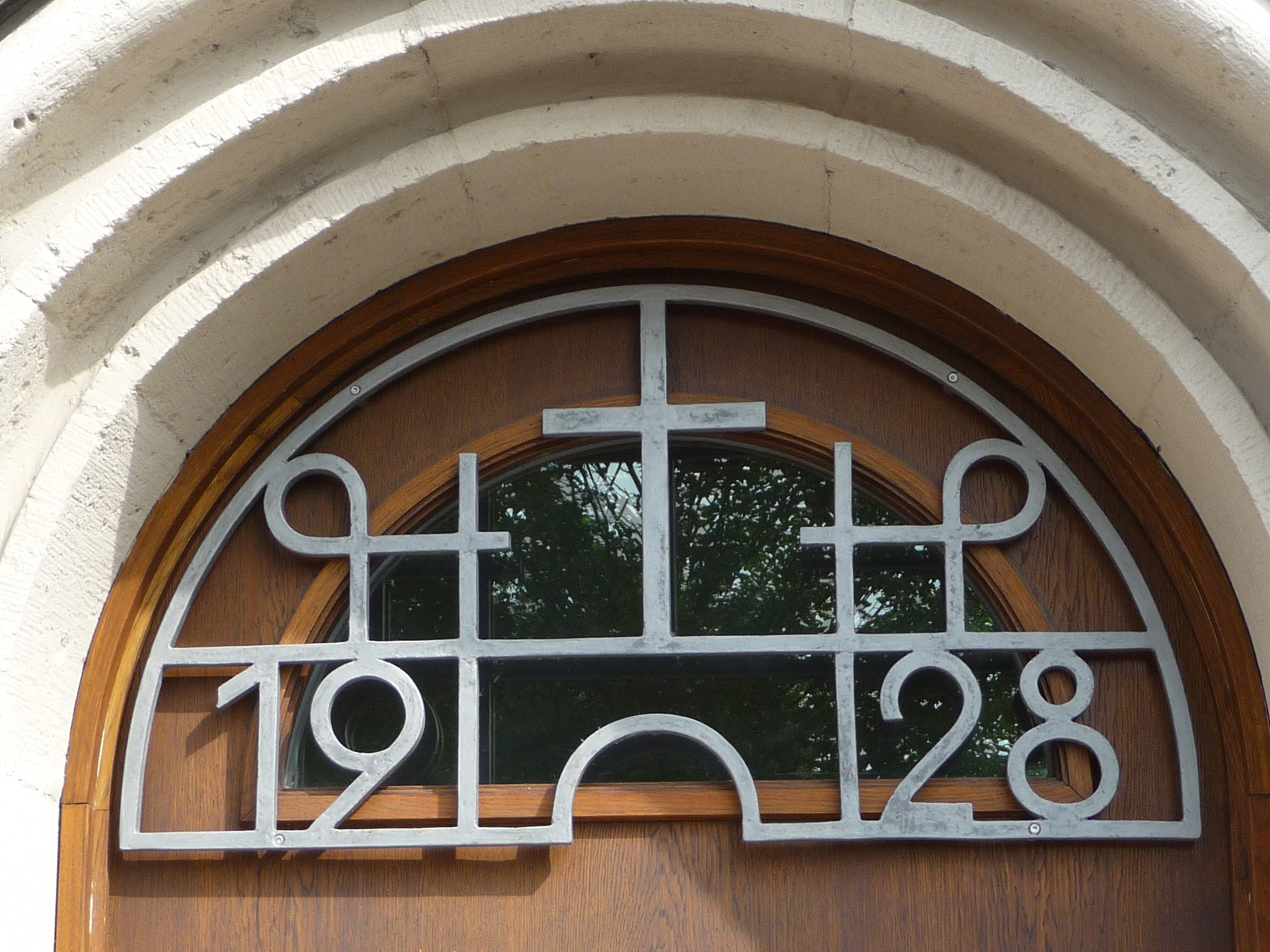 ehemaliges Priesterseminar, heute katholisches Bistumshaus in Bamberg, Oberfranken